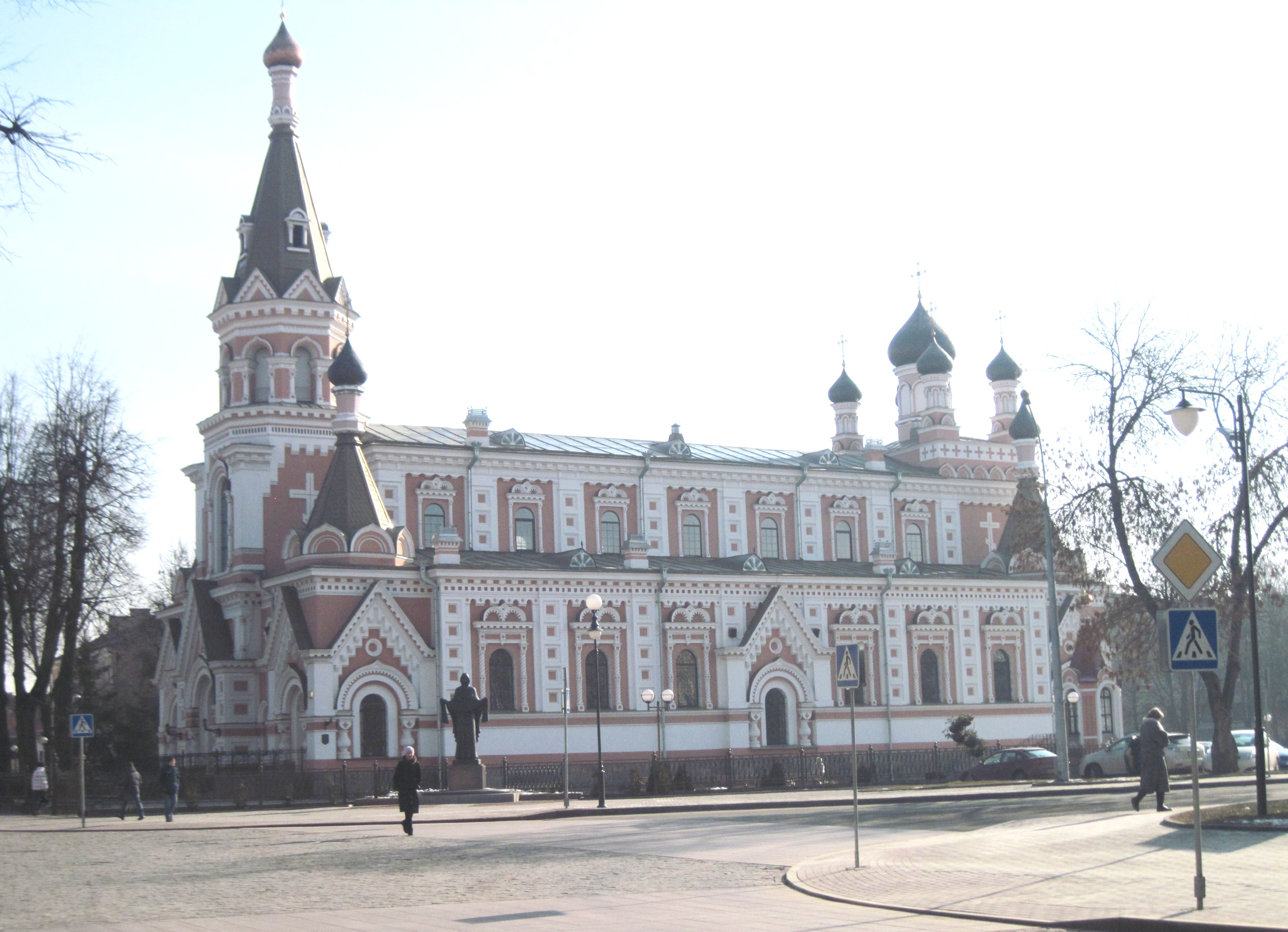 Пакроўскі сабор у Гродне